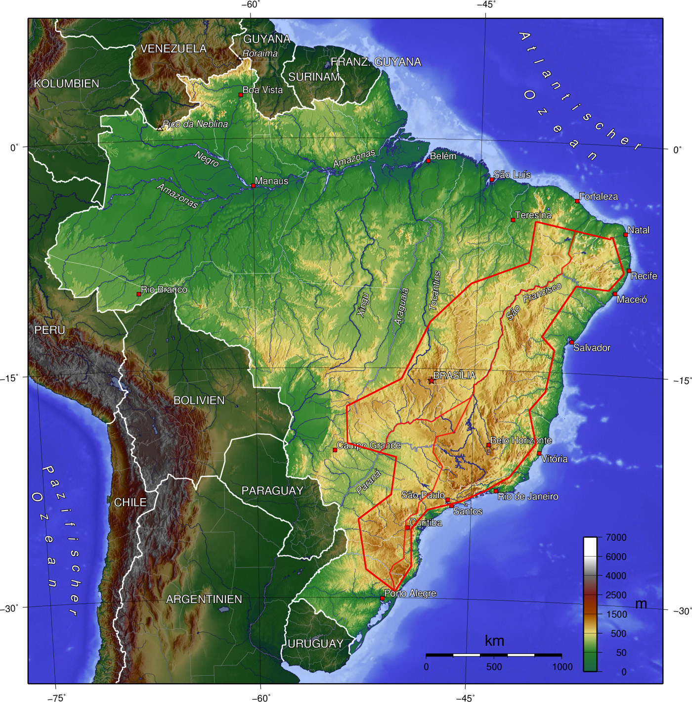 Das brasilianische Bergland, grob und mit zittriger Hand abgegrenzt vom Rest des Landes zu reinen Verdeutlichungszwecken (nur um mal dem ewigen "Brasilien ist Amazonien, und Amazonien ist tellereben" entgegenzuwirken).